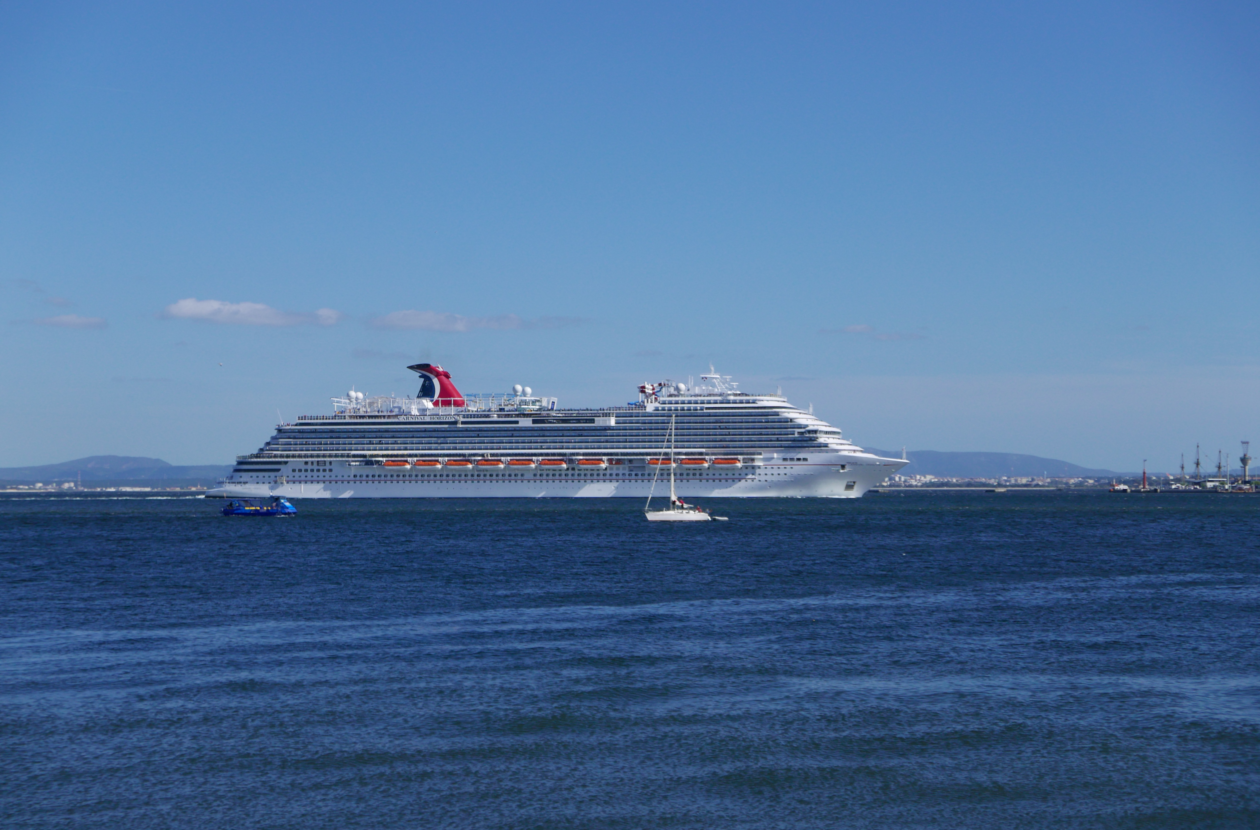 Lisbon, Portugal